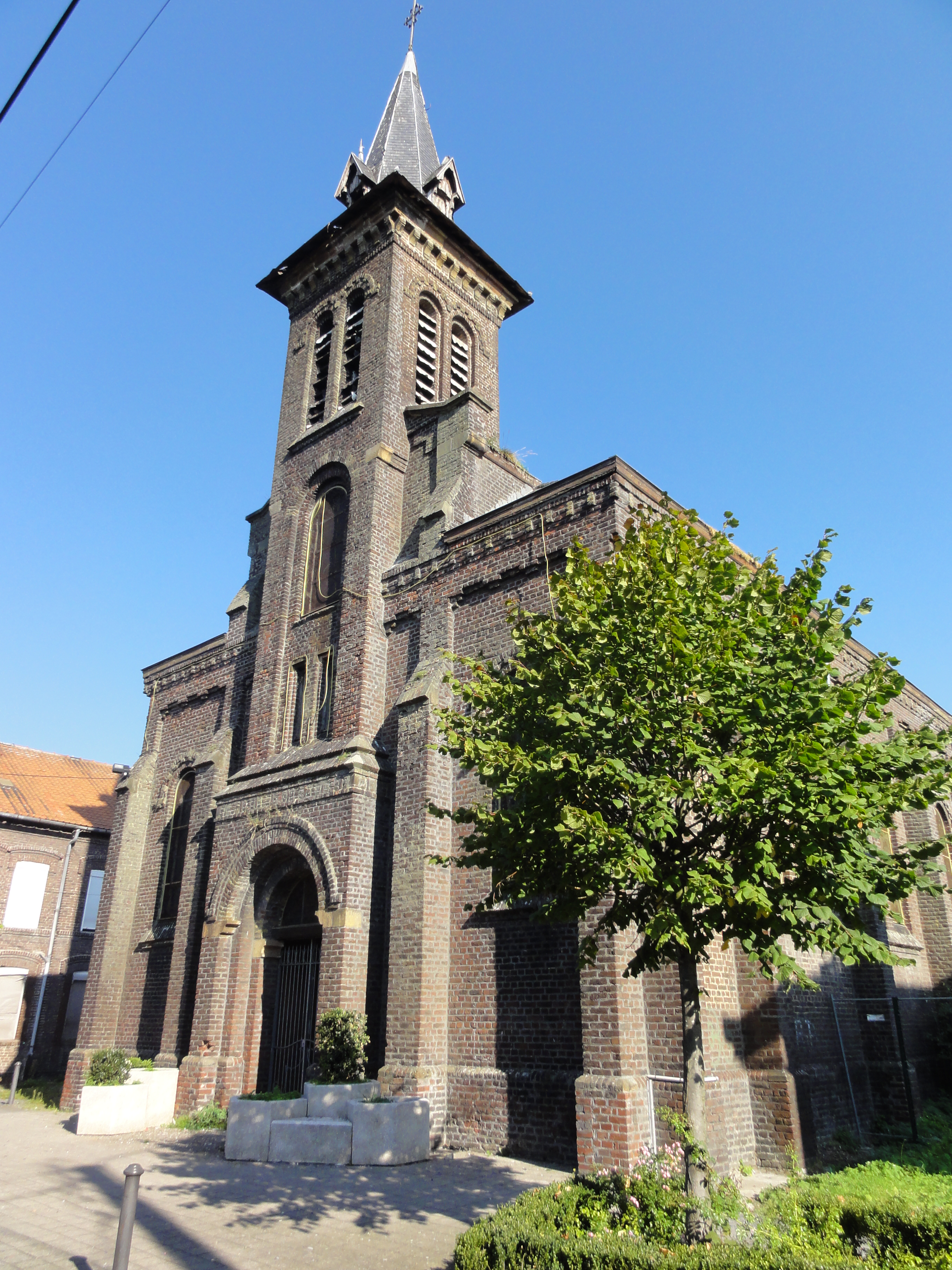 Église Saint-Adolphe des cités de la Fosse Thiers de la Compagnie des mines d'Anzin à Bruay-sur-l'Escaut, Nord, Nord-Pas-de-Calais, France.